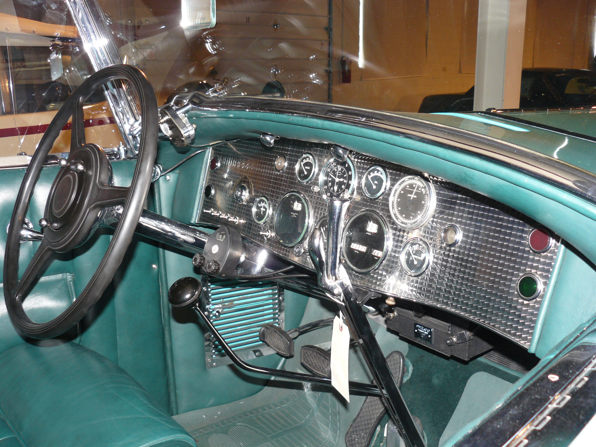 Musée d'Auburn